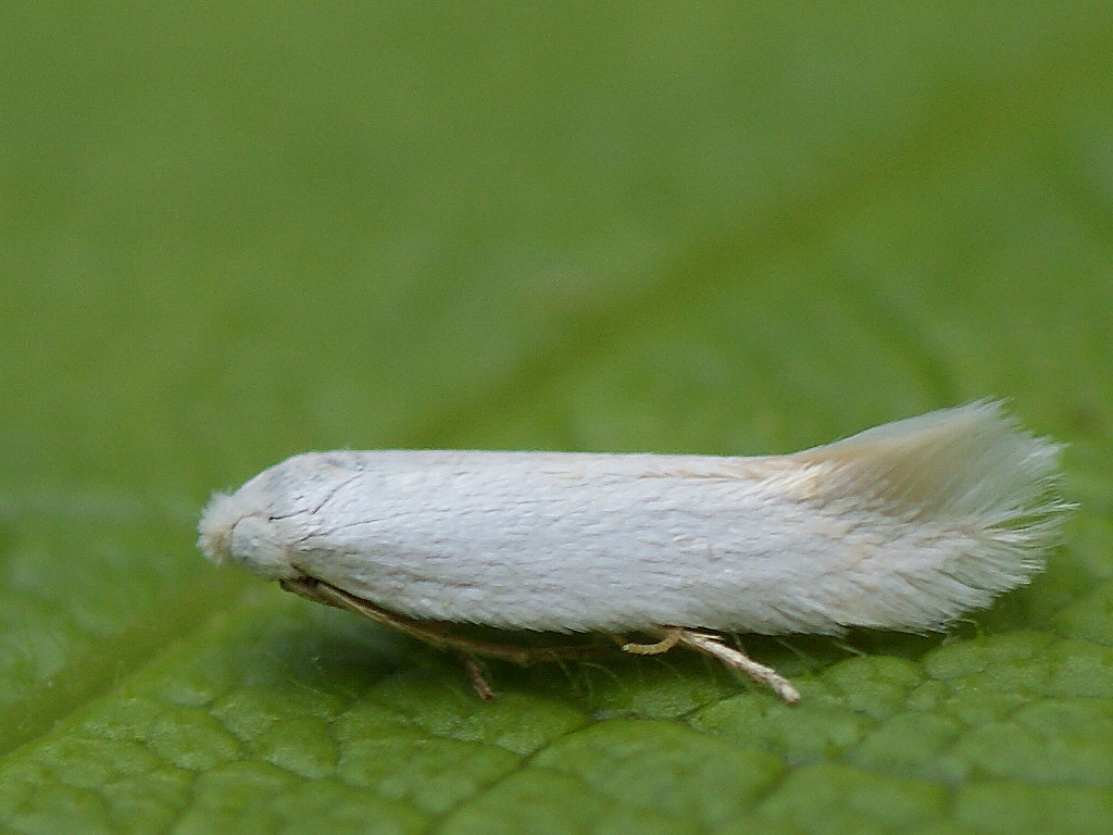 Exemplar found: Russia, Moscow Oblast, Odintsovsky District, near village Pestovo, 13.06.2014, by light МО, Одинцовский р-н, окрестности деревни Пестово, 13.06.2014, на свет